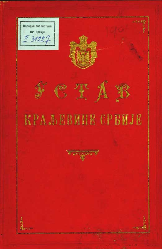 Српски (ћирилица): Устав Краљевине Србије из 1901. године